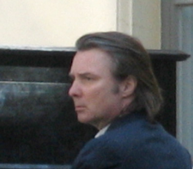 Pekka Hedkrok 12.5.2006.